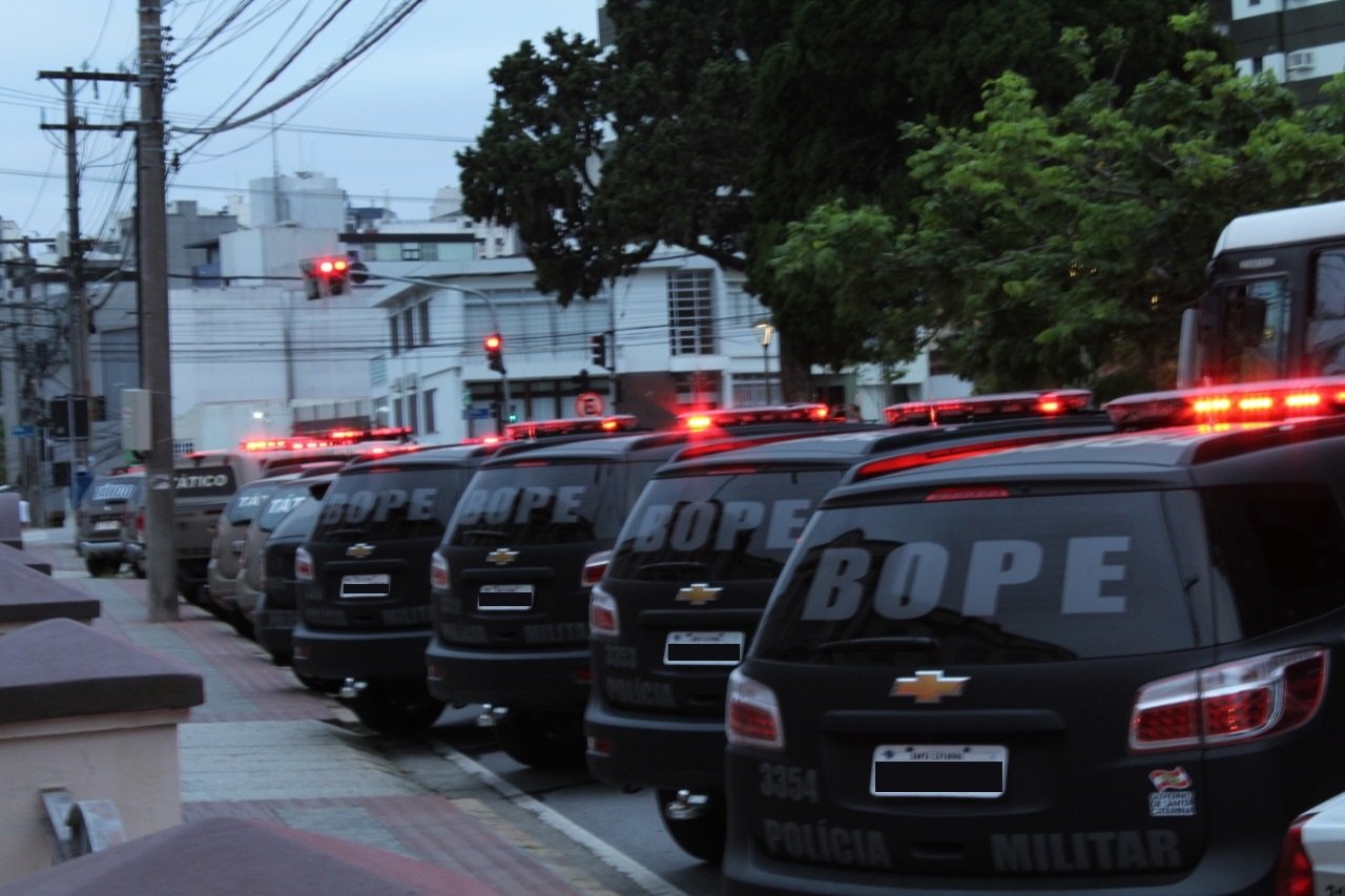 Foto oficial PMSC